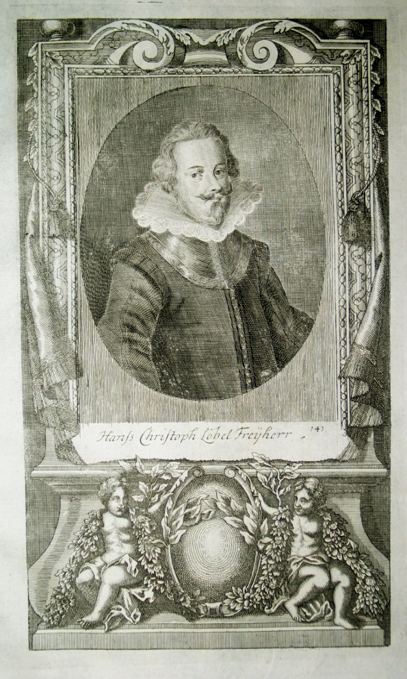 Hans Christoph Freiherr von Löbl (1578 bis 1636 oder 1638): Hans Christoph Löbel Freyherr. Österreichischer Feldwachtmeister: 1630 - 32 Hofkriegsratspräsident.